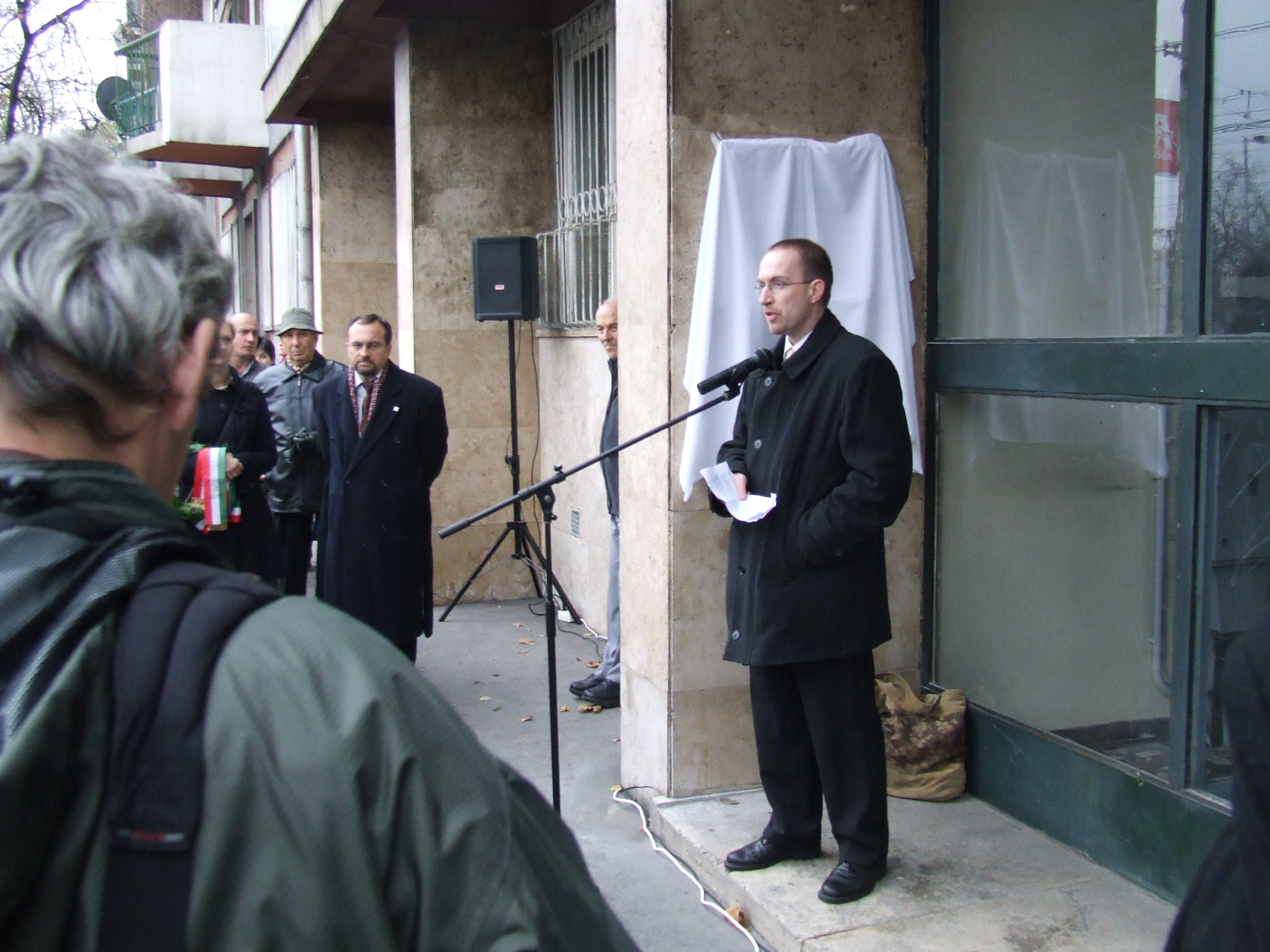 Hédervári Péter emléktábla avatása, Rezsabek Nándor beszéde. Budapest